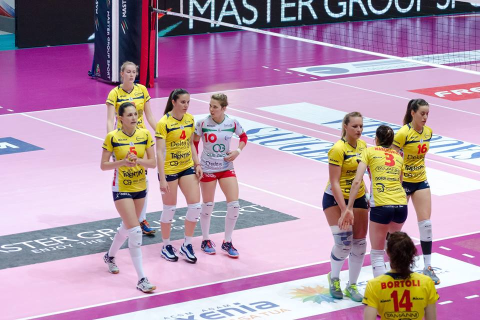 Stagione 2015-2016